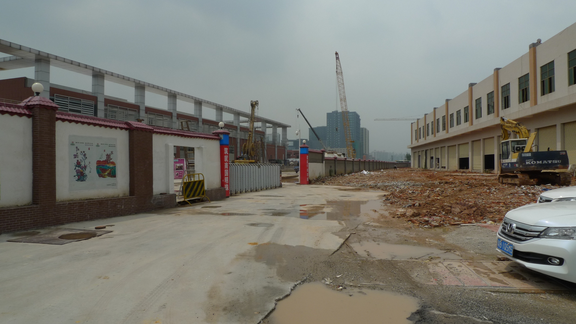 Baiyun, Guangzhou, Guangdong, China